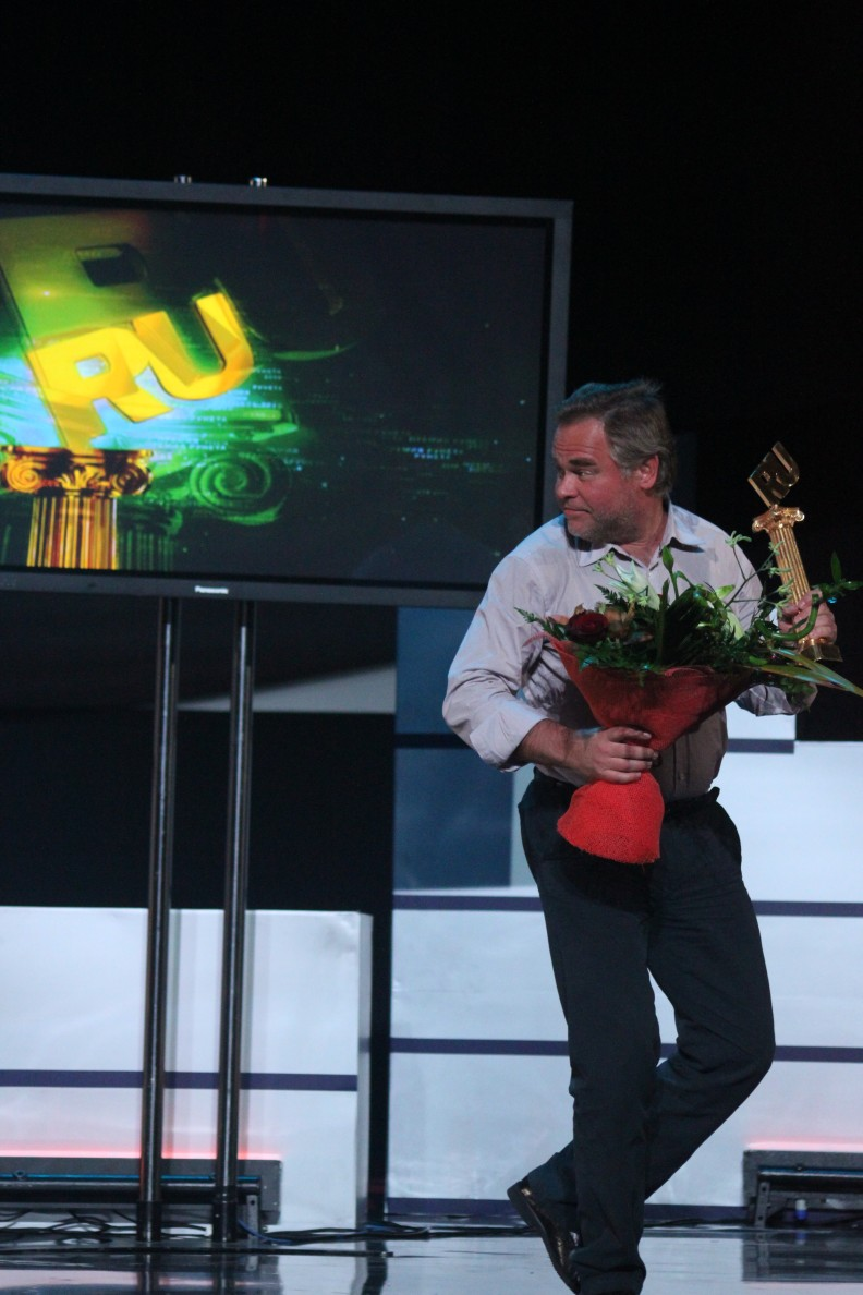 Eugene Kaspersky (Runet Prize 2010)